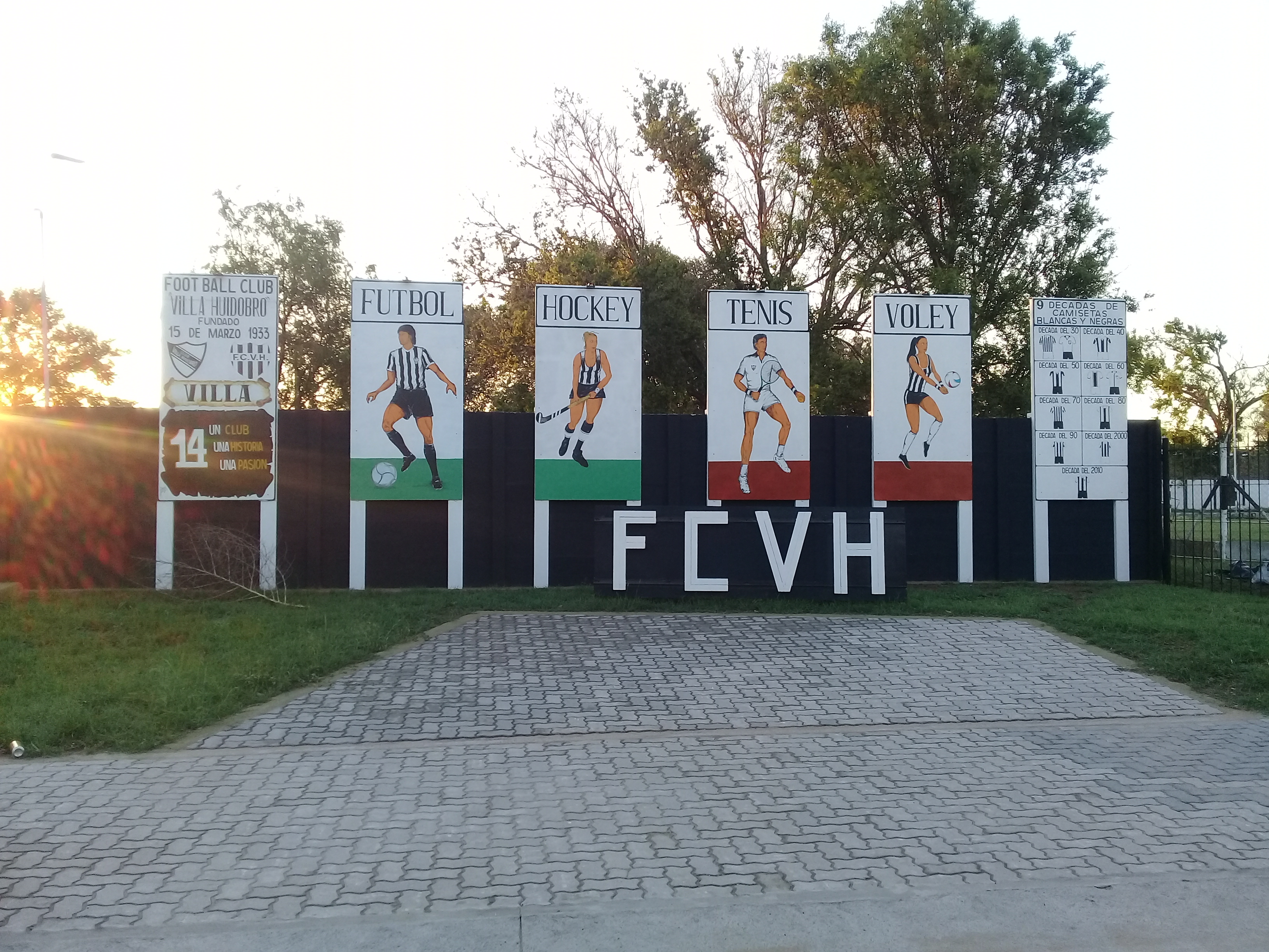 Entrada de la sede deportiva del FoobBall Club Villa Huidobro Provincia de Córdoba